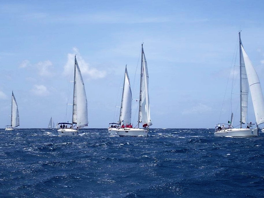 Esta imagen la tome en el evento de sailing week en Antigua en el 2012. Yo vivo en Antigua y Barbuda desde hace 8 anos.